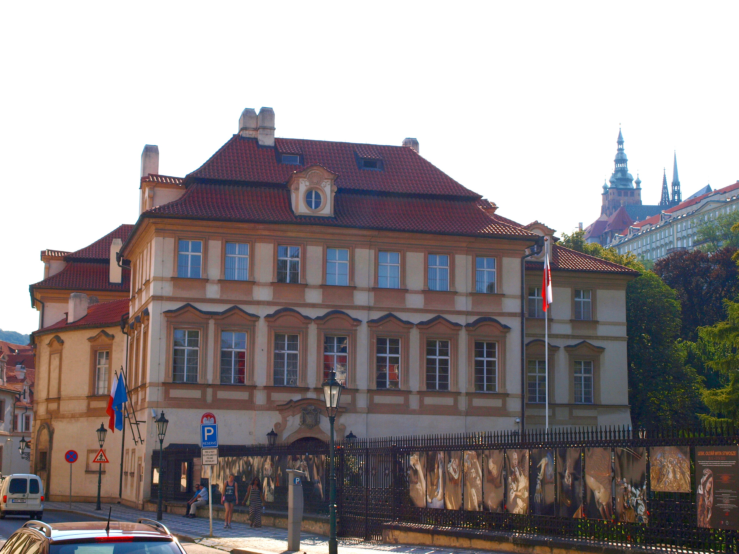 Fürstenberský palác (Valdštejnská)